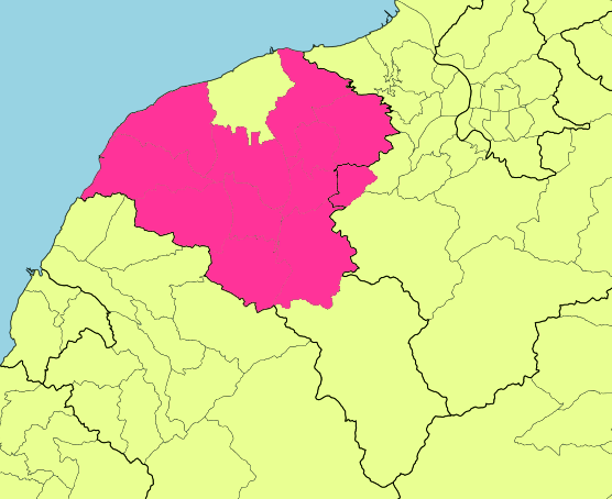 行政院主計處定義的桃園中壢都會區範圍。